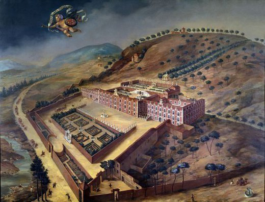 Palacio de la Florida, construido por Francisco de Moura, III marqués de Castel Rodrigo, en la huerta de la Florida. Copia del original que se encuentra en el Palacio de Mombello, Imbersago, Lombardía, Italia. Museo de Historia de Madrid, IN 1780.